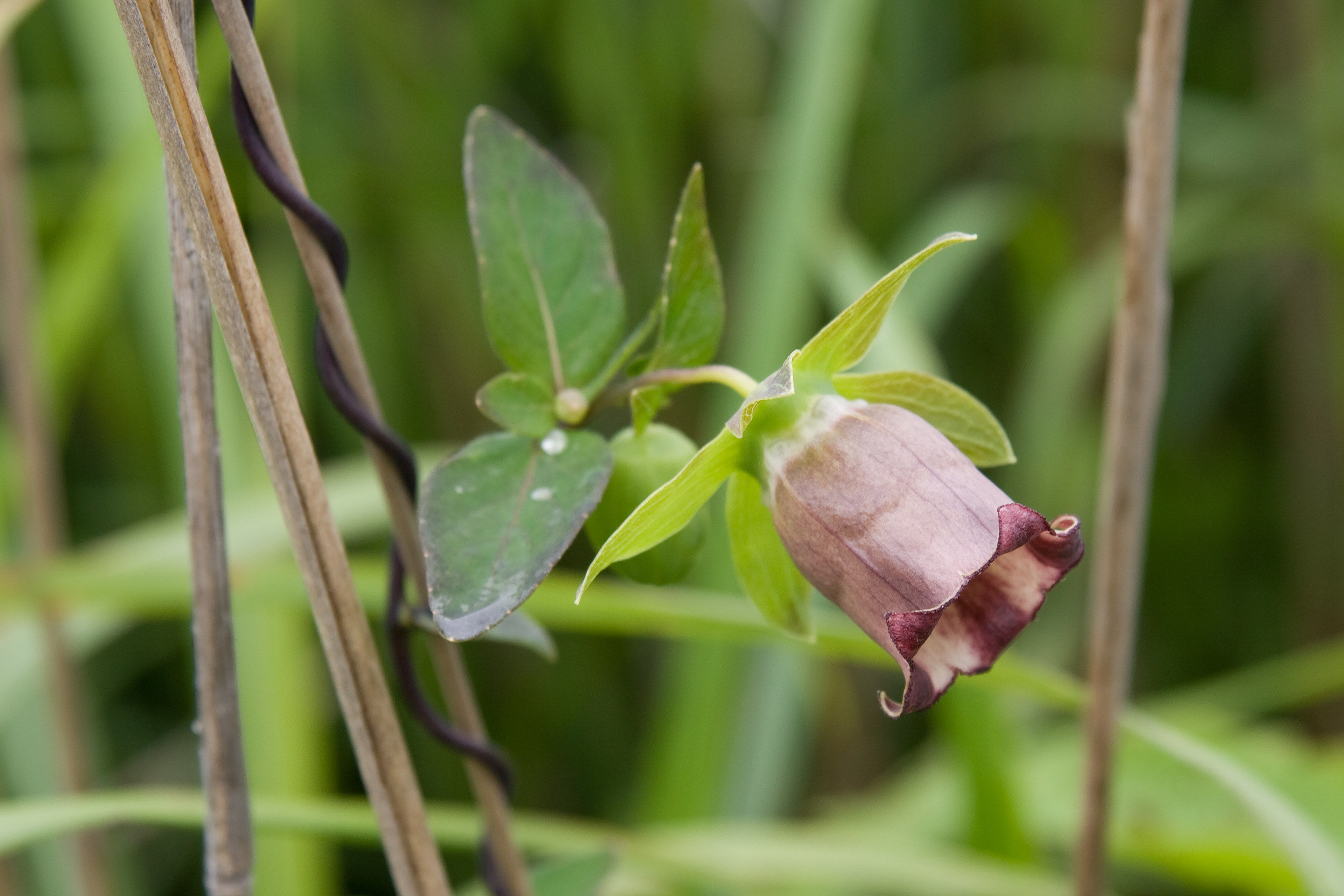 バアソブ (学名:Codonopsis ussuriensis)